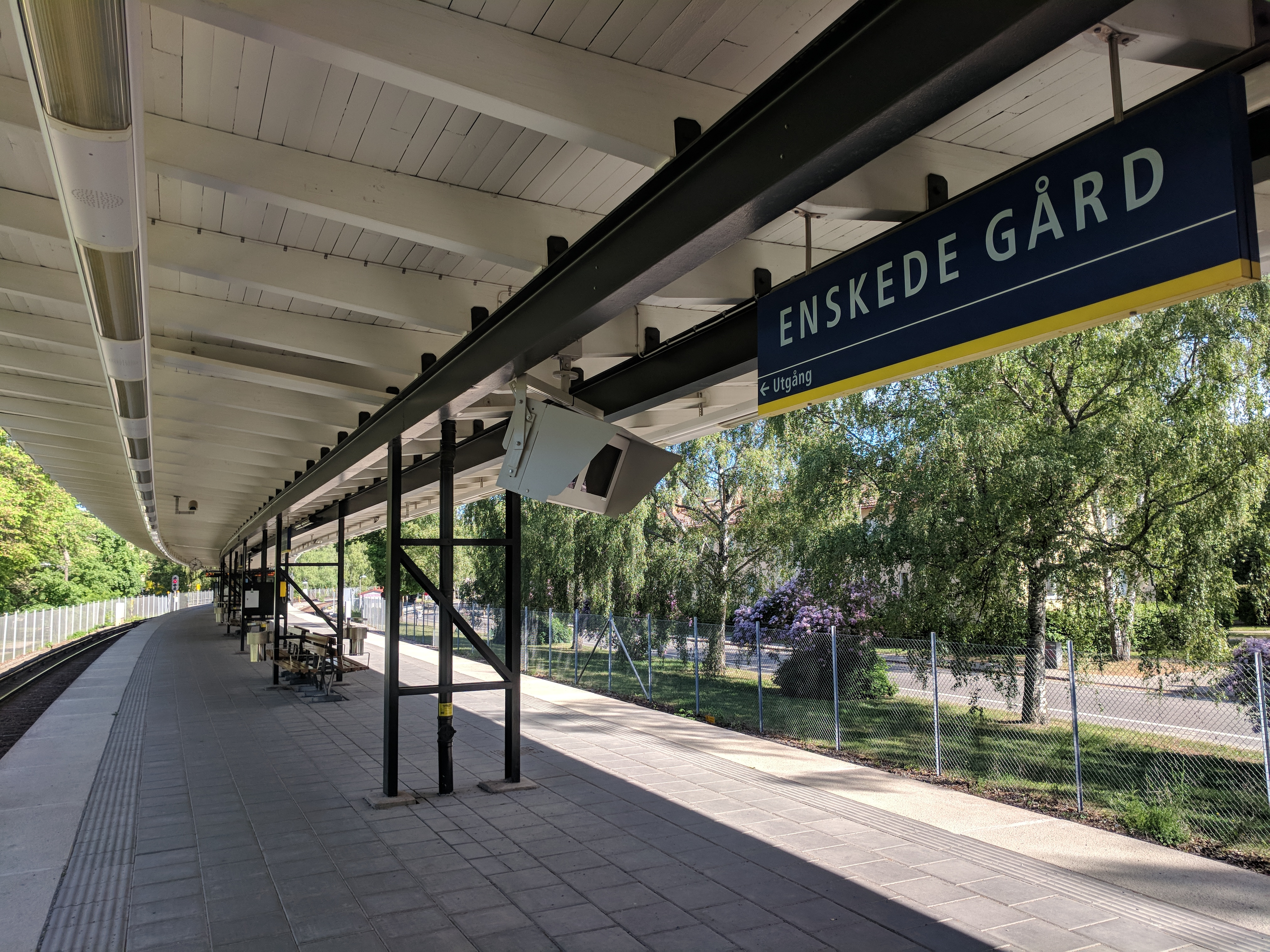 Enskede Gård metro